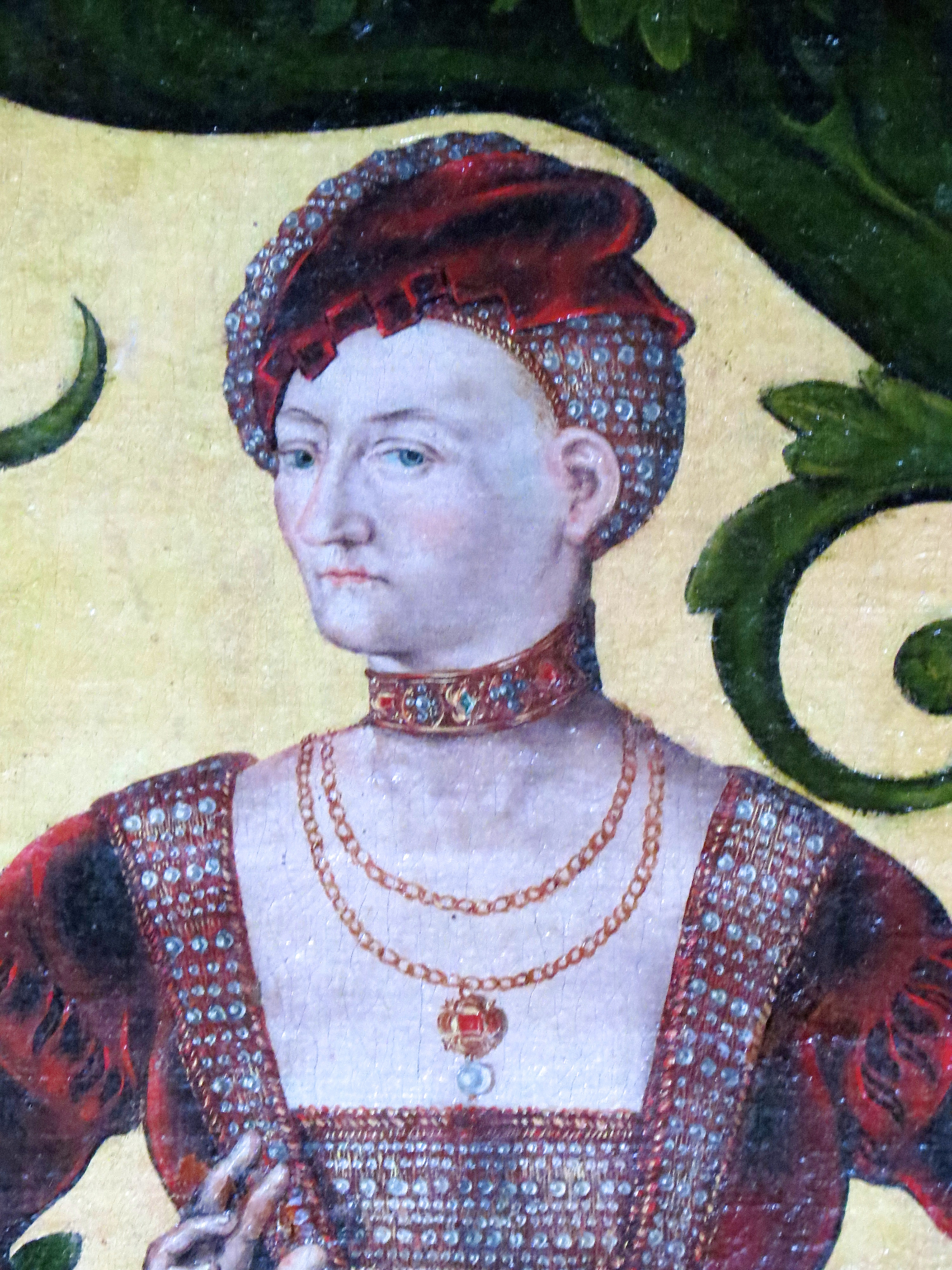 Anna af Brandenburg (1487-1514), gift med Frederik I. Fra anetavle på Frederiksborg Slot.